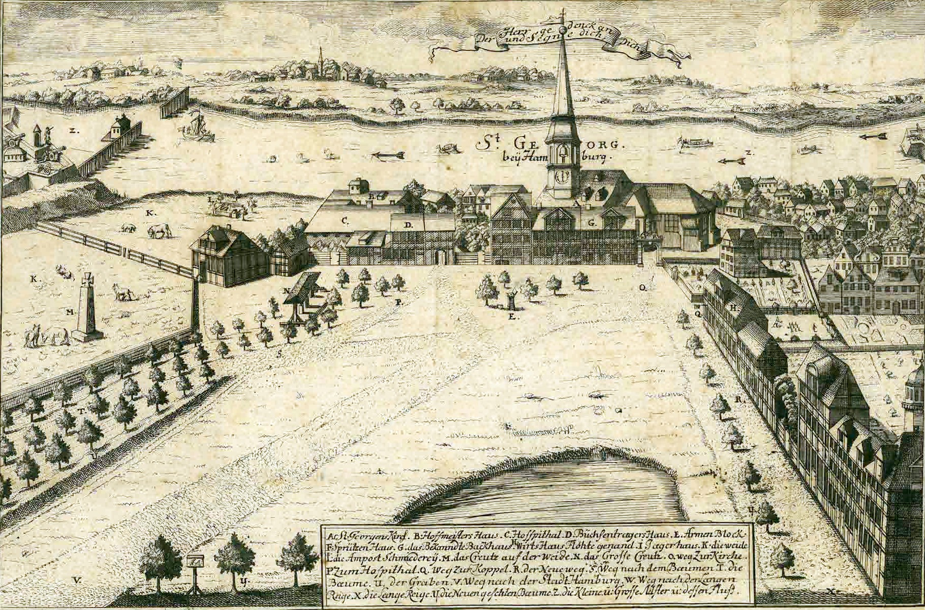 St Georg Hospital und Vorstadt um 1720, Kupferstich auf dem Vorsatz von Joh. Balt. Hempels "Ausführliche Nachricht von dem H. Ritter Georgio, und dem, was von ihm den Nahmen führet, insonderheit aber von dem Gestiffte St. Jürgens bey Hamburg", Hamburg 1722